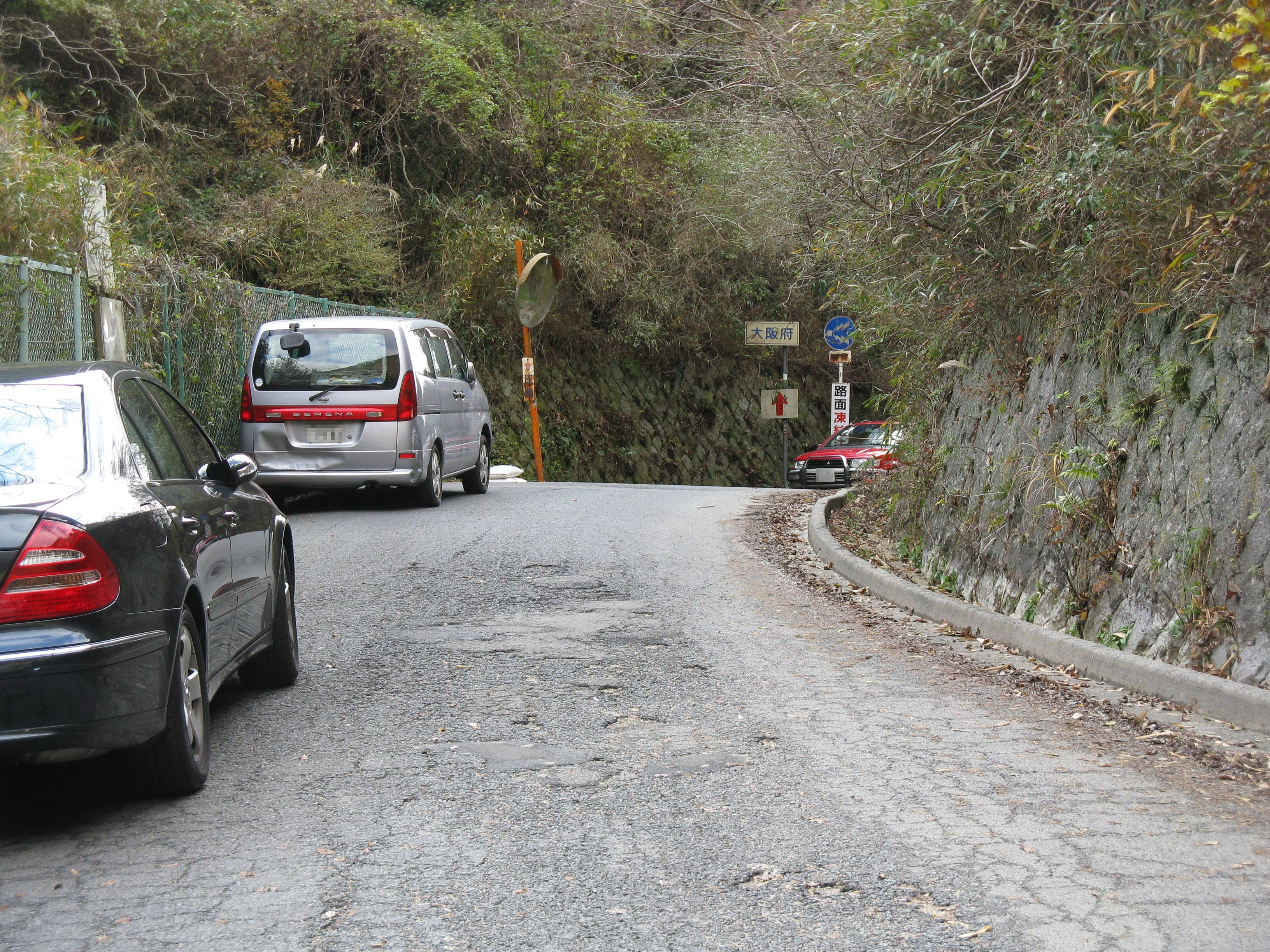 水越峠（奈良県側より大阪側を撮影）